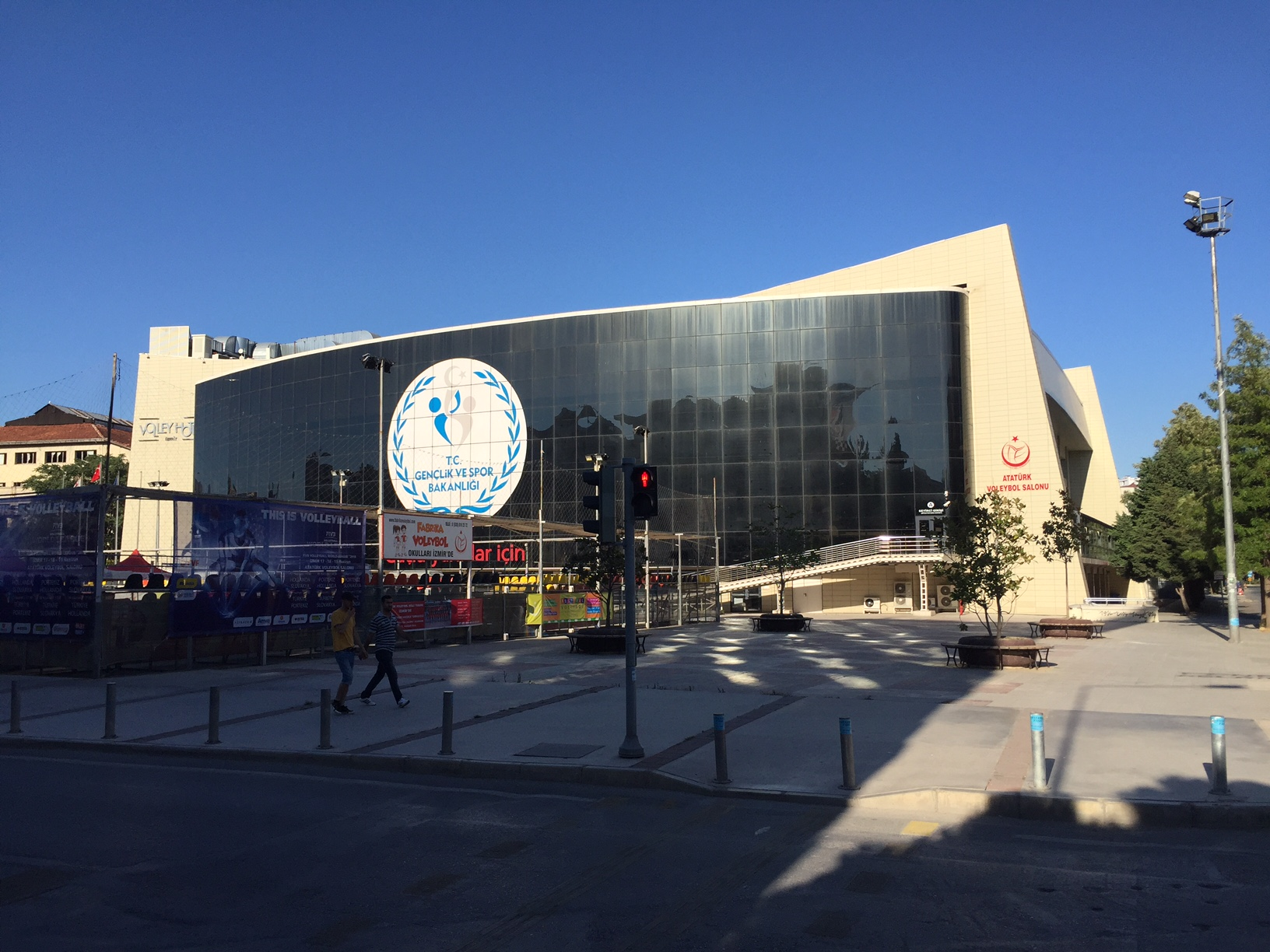 Spor